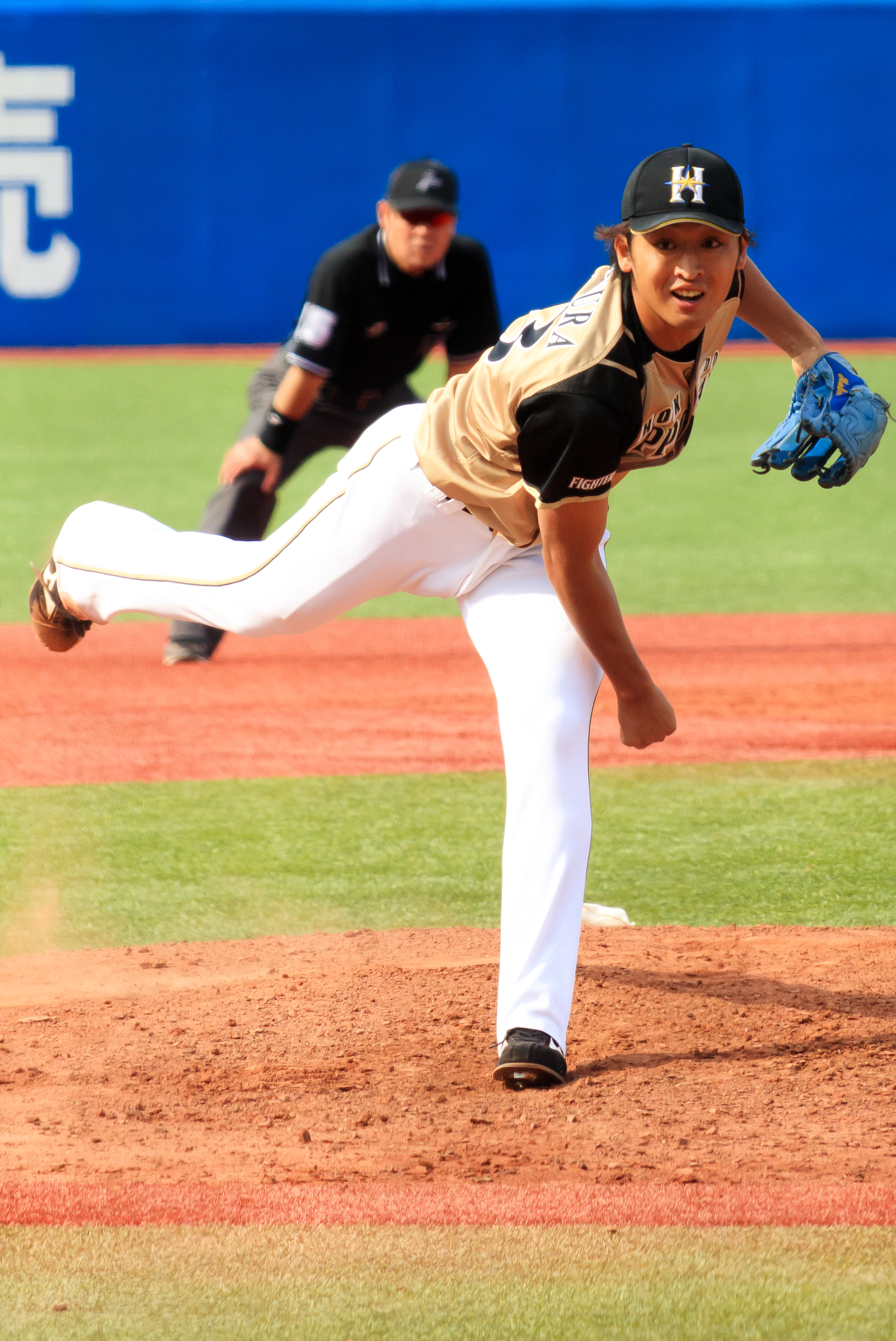 白村。